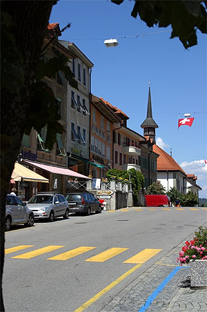 Grand-Rue à Romont mit Blick zur Eglise des Capucins